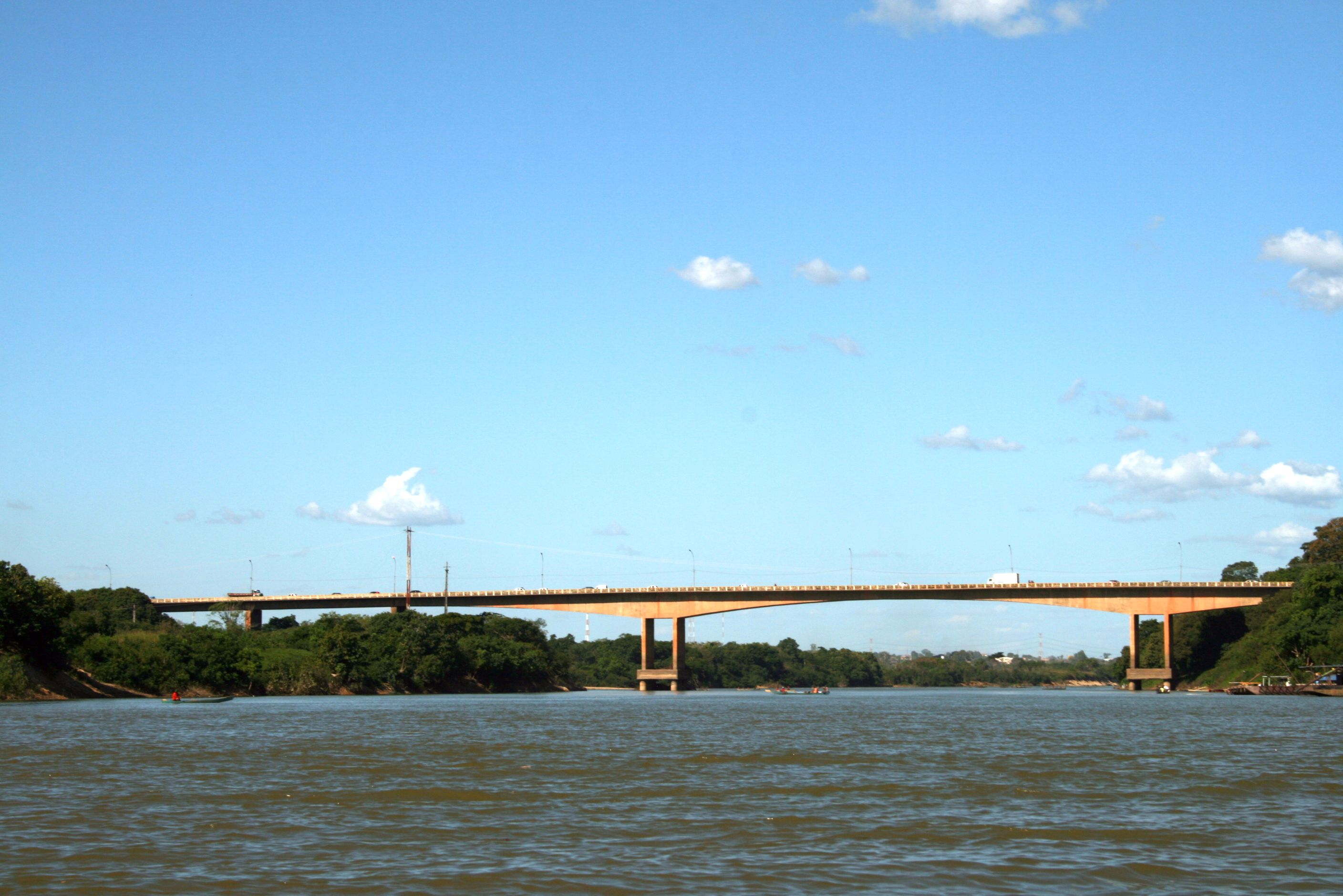 Rodovia Transamazônica cruzando o rio Itacaiunas. Em 2011 foi concluída a duplicação desta ponte.